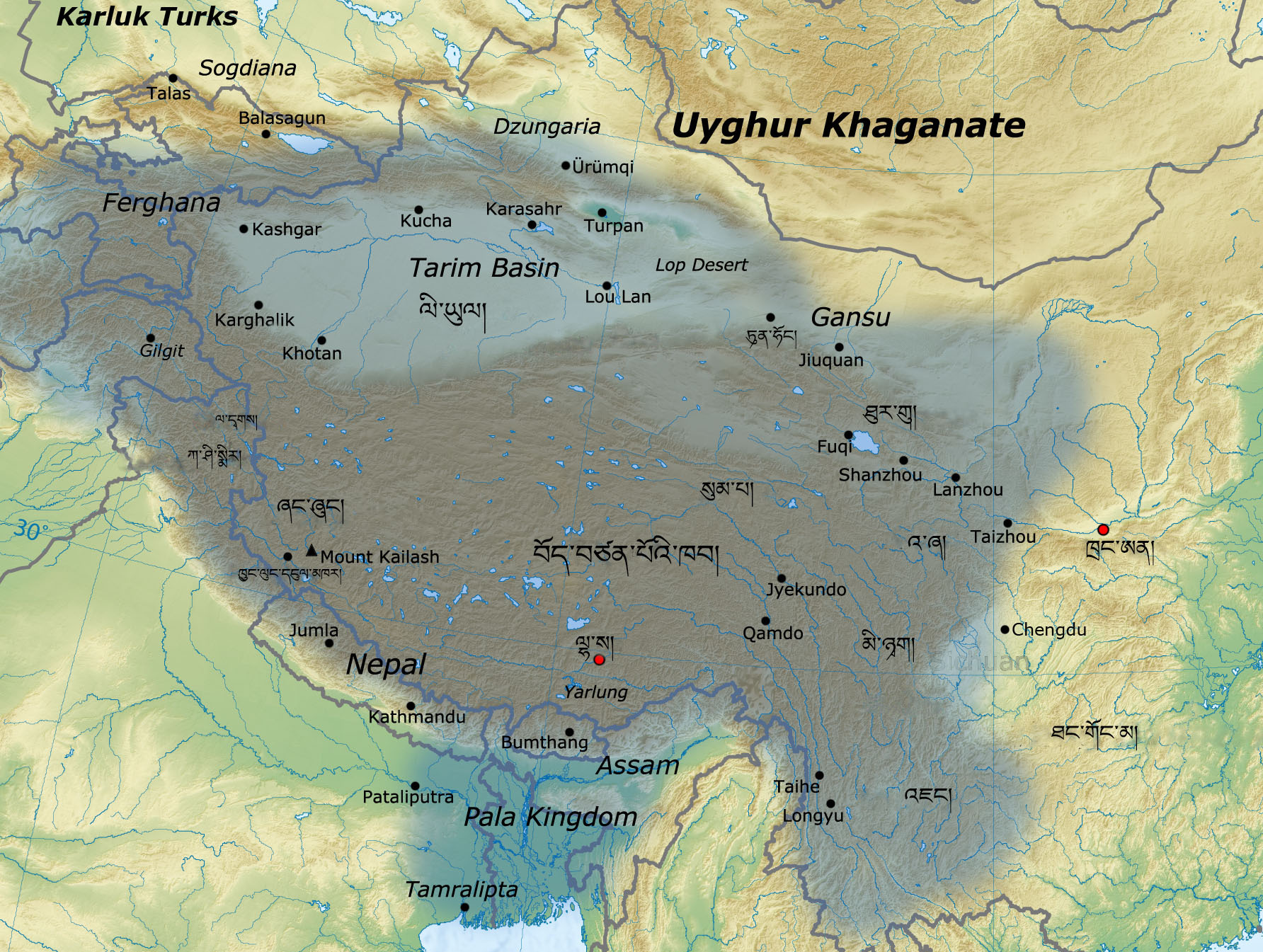 བོད་ཡིག: བོད་བཙན་པོའི་རྒྱལ་ཁམས། སྤྱི་ལོ་ 780s ནས་ 790s བར།